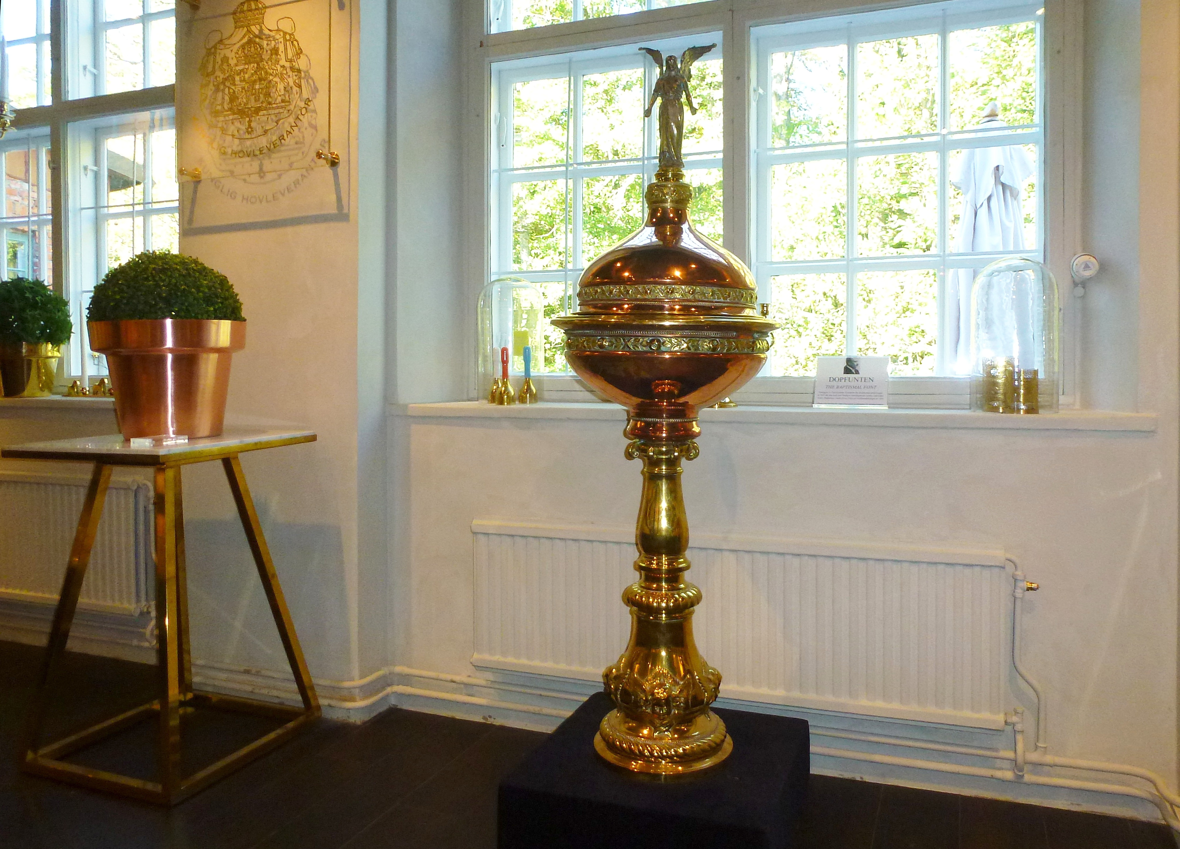 Skultuna bruk